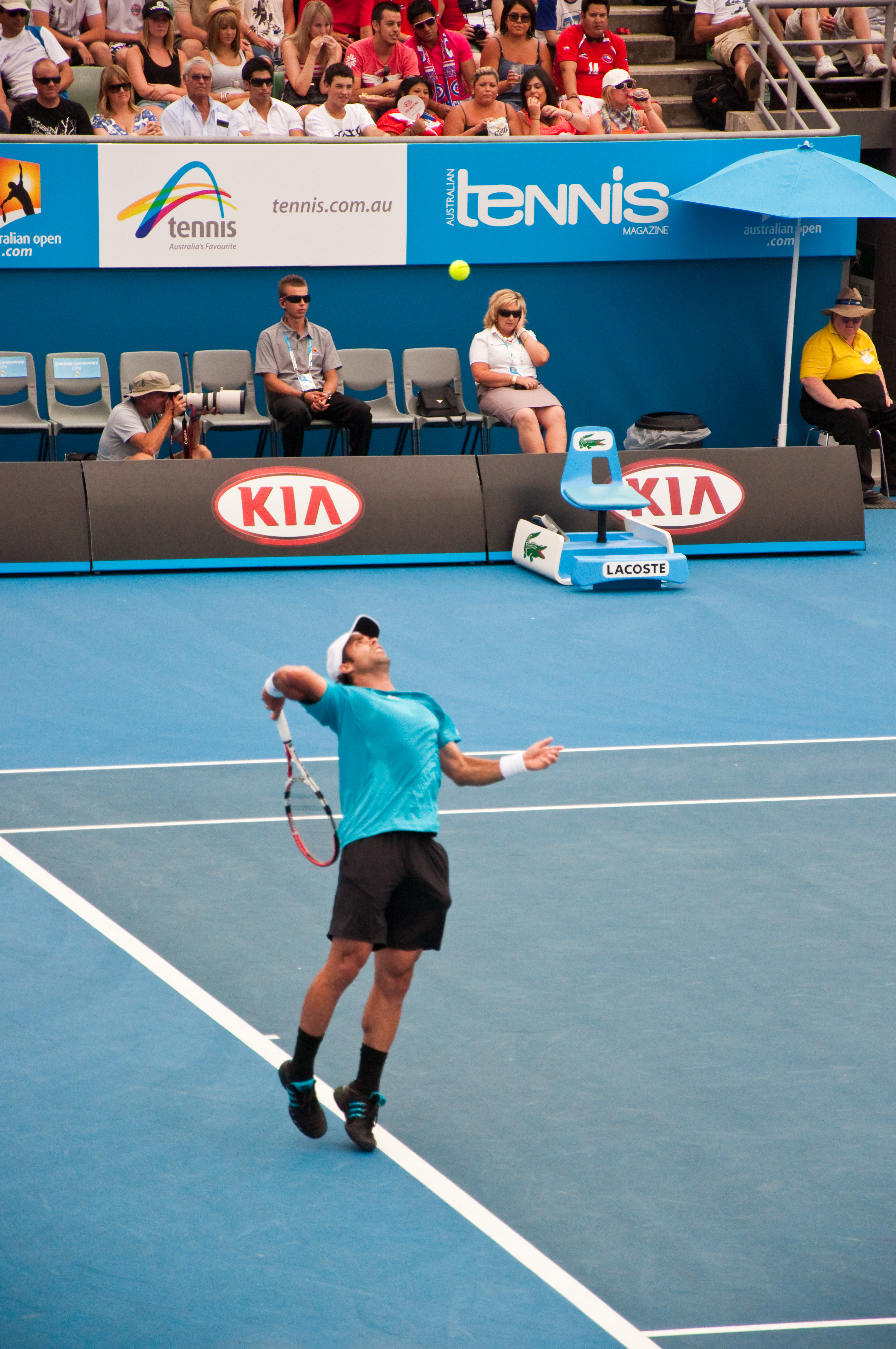 Melbourne Australian Open 2010 Fernando Gonzalez